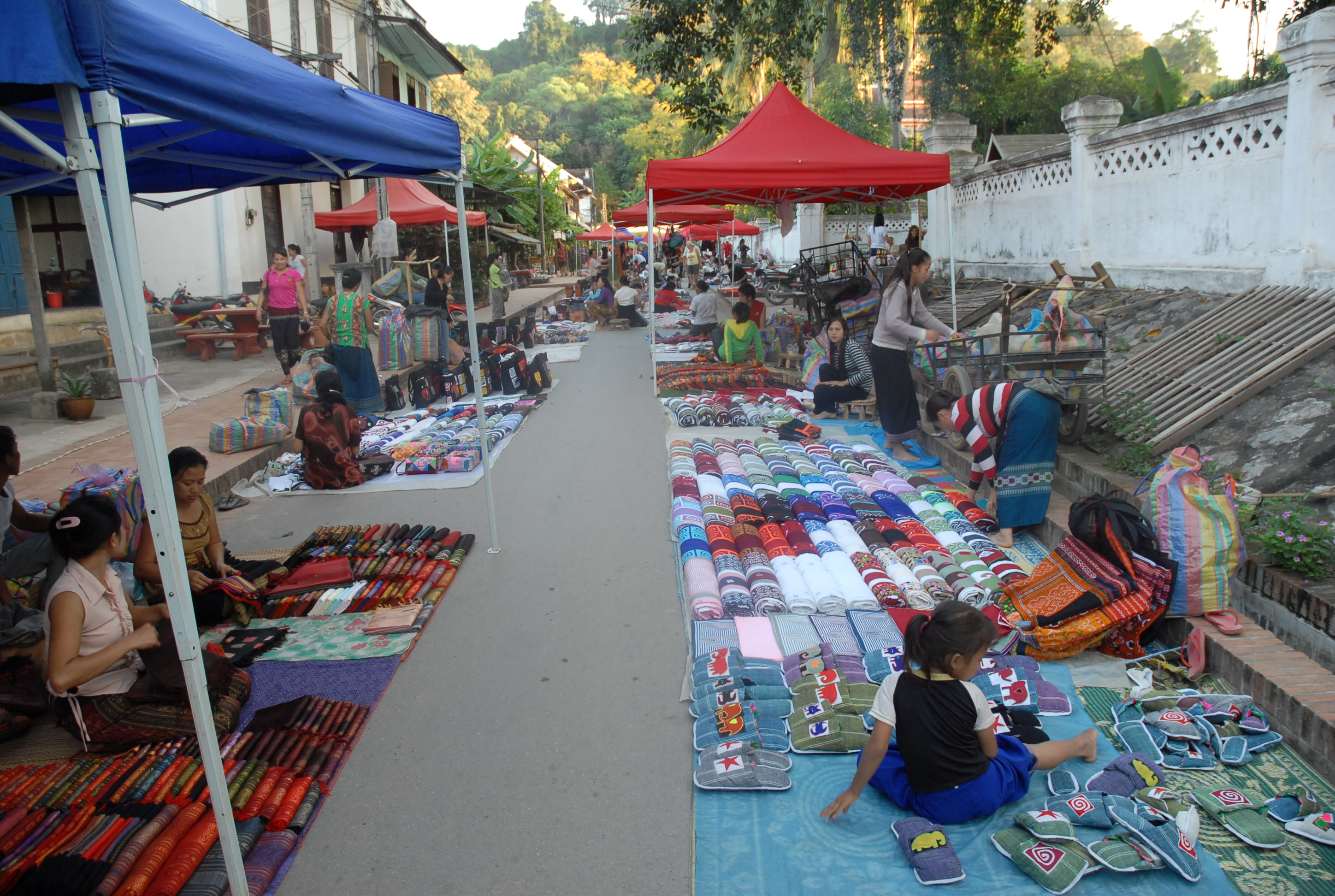 Luang Prabang : marché du soir (soieries, objets artisanaux)